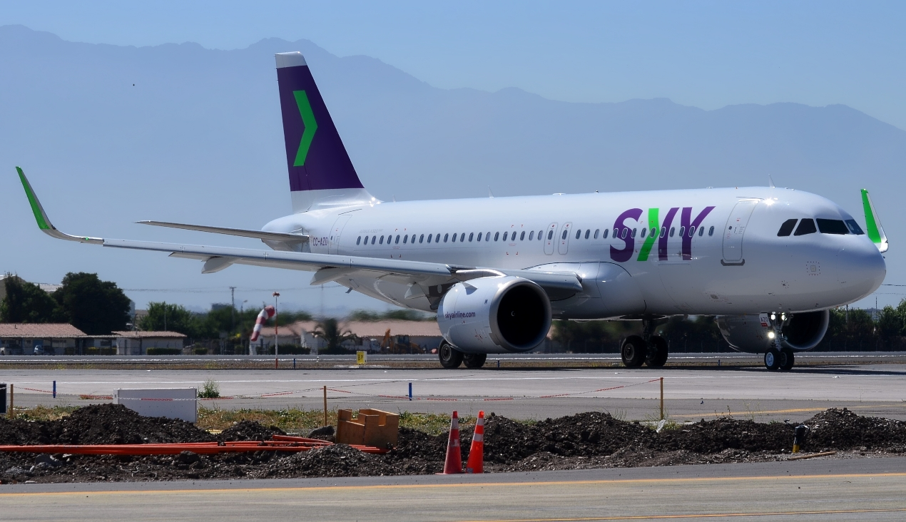 CC-AZO en SCEL